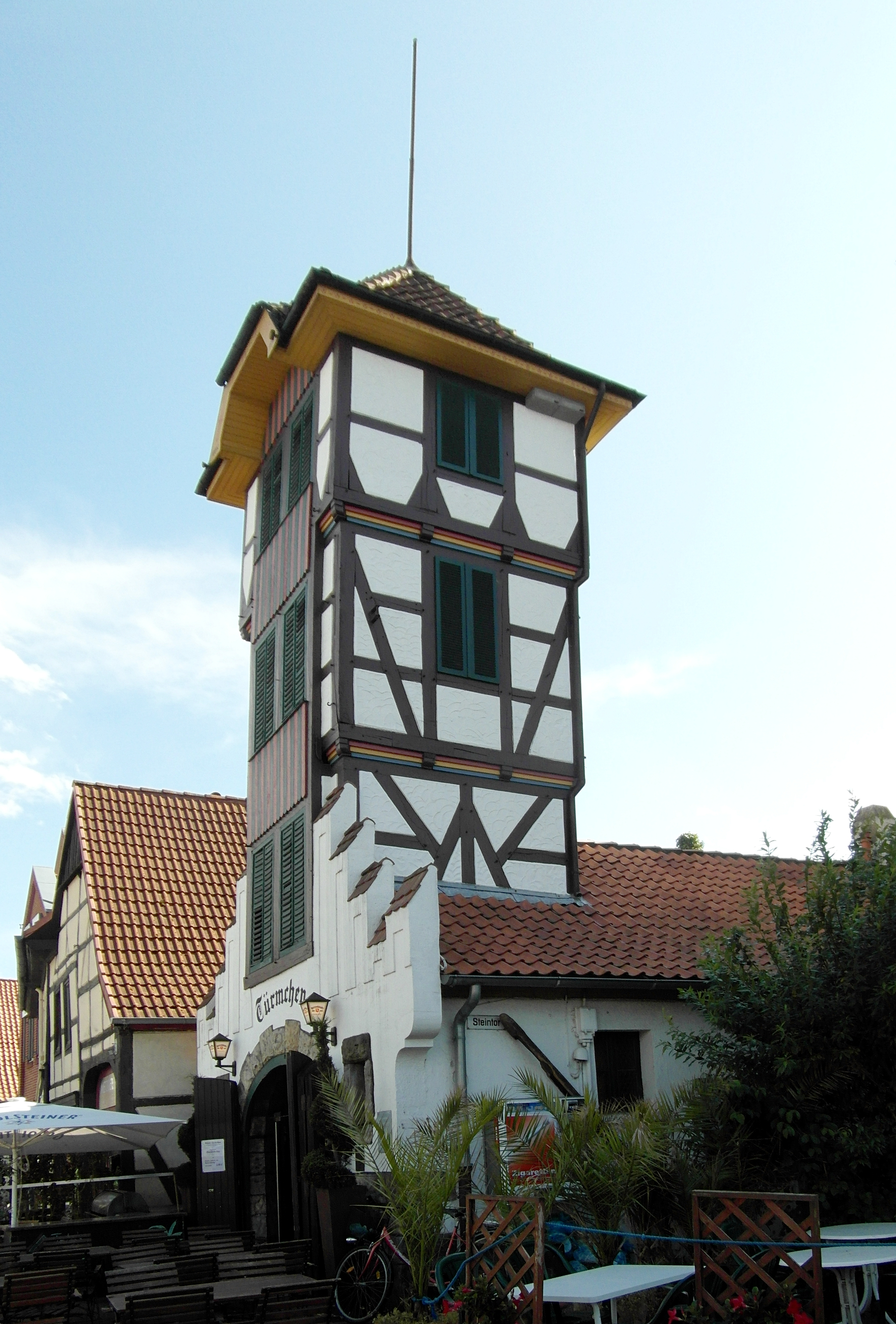 Das Türmchen in Gehrden. Der ehemalige Feuerwehrturm ist ein durch seine Lage und Gestaltung das Stadtbild als Wahrzeichen prägender 4-geschossiger Fachwerkturm mit Zierfachwerk.